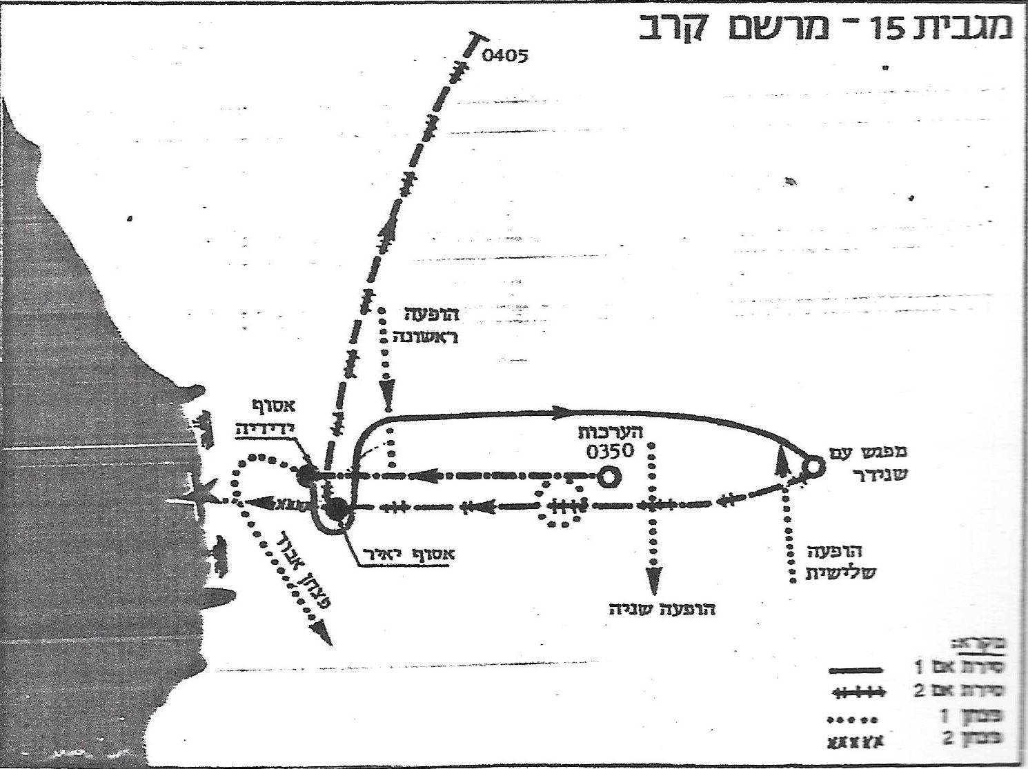 תרשים פעולת מגבית 15 על ע'רדקה תקיפה בסירות נפץ 20-19 באוקטובר 1973